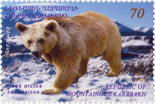 «Վայրի բնության պաշտպանություն» նամականիշ: Շրջանառության օրը` Սեպտեմբեր 10, 2009 Մարման օրը` Շրջանառության մեջ է Անվանագինը`70 Չափը` 42.5/28.5 մմ Մեկ թերթի վրա` 10 (2x5) Տպաքանակը` 49500 հատ Հեղինակ`Սերգեյ Քալանթարյան